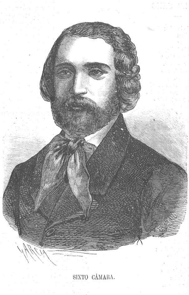 Sixto Cámara. Grabado en madera de José Severini por dibujo de García. La Ilustración Republicana Federal, año I, n.º 9, 13 de agosto de 1871, p. 137